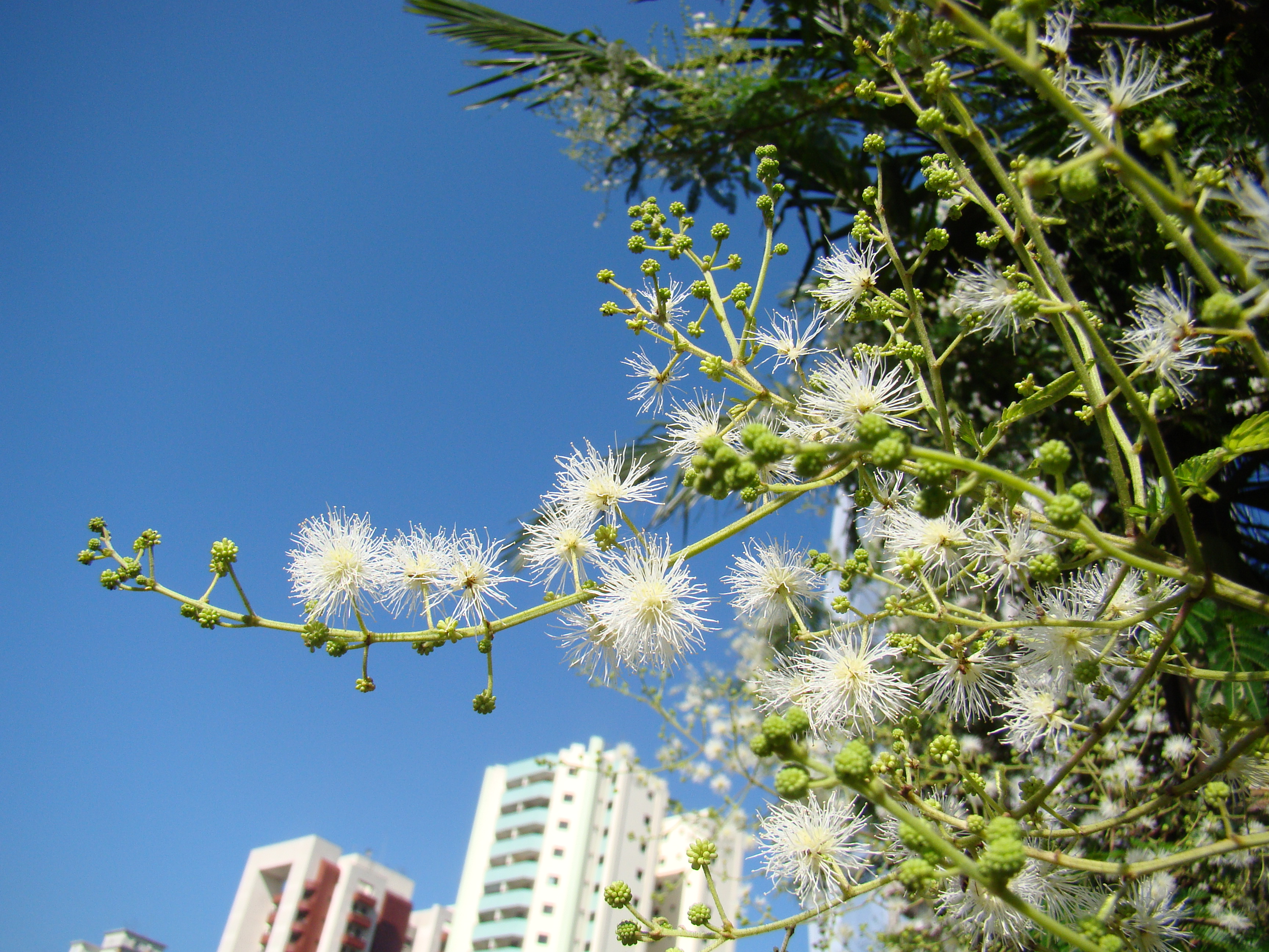 ceret Park, Sao Paulo